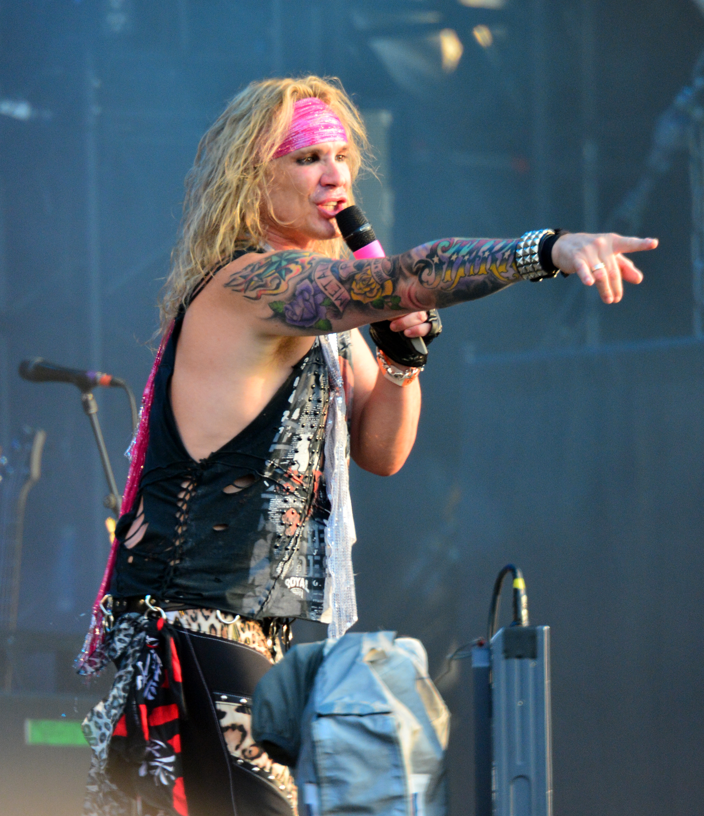 Steel Panther beim Wacken Open Air 2014